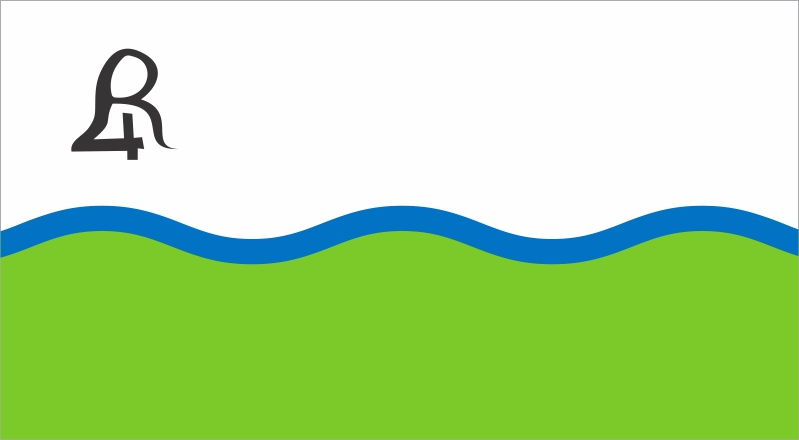 Bandera de la ciudad de Rio Cuarto